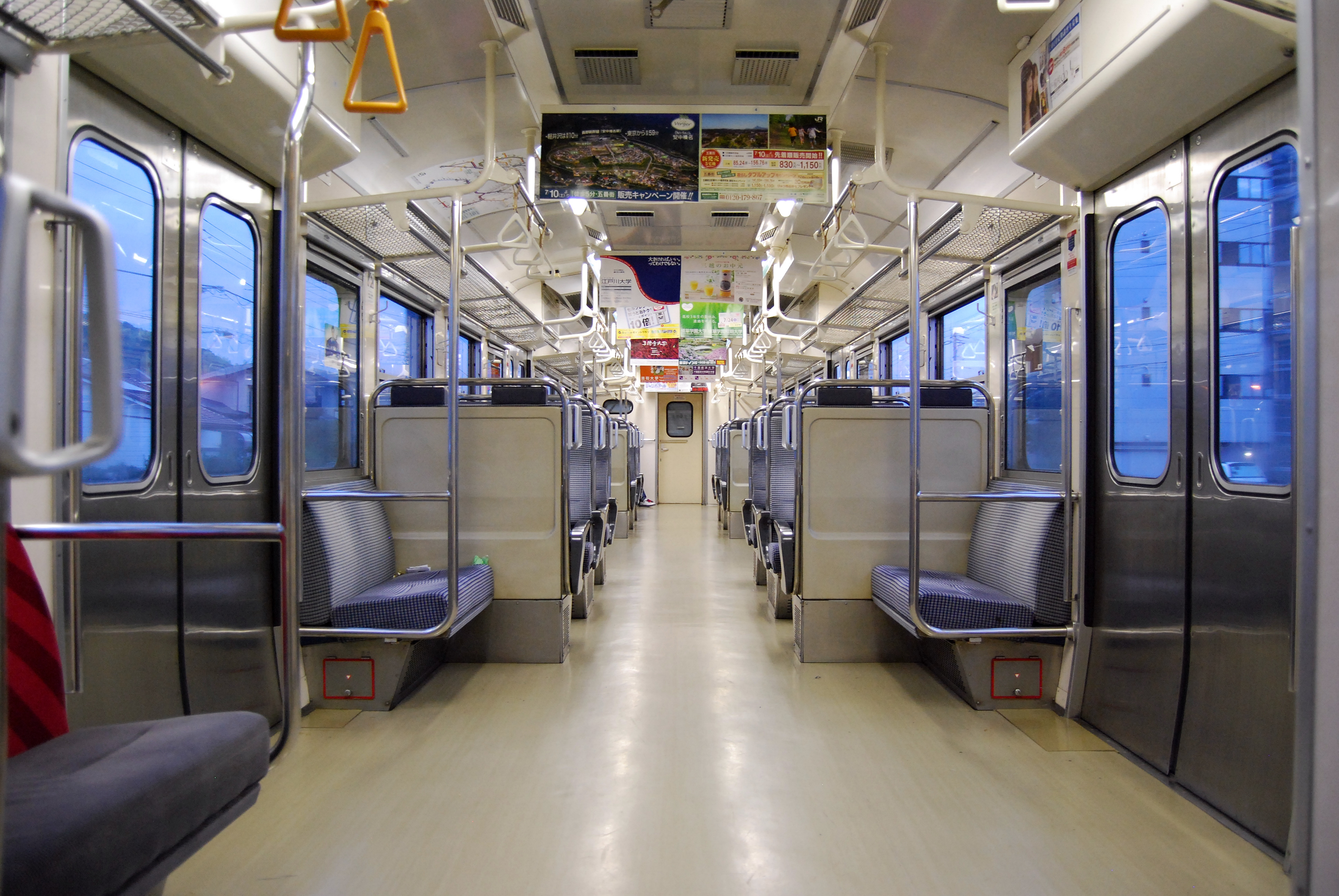 幕張車両センター所属の113系リニューアル車の車内